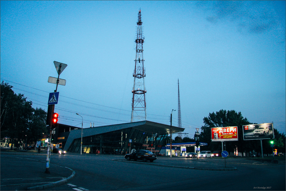 перехрестя проспекта О.Поля і П.Орлика